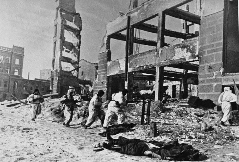 Russland, Kesselschlacht Stalingrad ADN-ZB/SNB/ II. Weltkrieg 1939-45 Die Stalingrader Schlacht begann im Juli 1942. In erbitterten, beiderseits verlustreichen Kämpfen wehrte die Rote Armee das weitere Vordringen der faschistischen Truppen ab. Während der sowjetischen Gegenoffensive im November 1942 wurden über 300 000 Mann eingeschlossen. Die Reste dieser Verbände, etwa 91 000 Mann, kapitulierten am 31.1. und 2.2.1943 Mit einer roten Fahne (r.), die sie am höchsten Punkt befestigen wollen, stürmen Rotarmisten eine Ruine am zentralen Platz in Stalingrad. Zentralbild II. Weltkrieg 1939-1945 Schlacht um Wolgograd (Stalingrad) 1942-43. Straßenkämpfe in Wolgograd